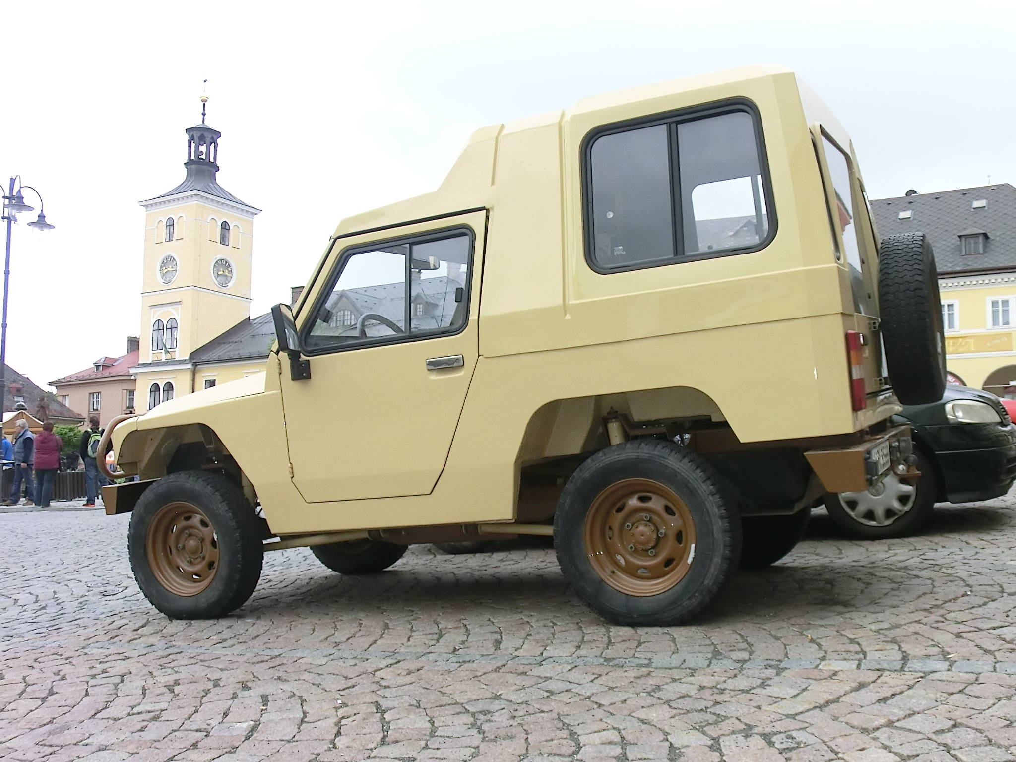 Terénní automobil Avia A11 (licence Auverland A3) zavítala do Jilemnice u příležitosti akce Tatra v Českém ráji 2014, soutěže se však neúčastnila.